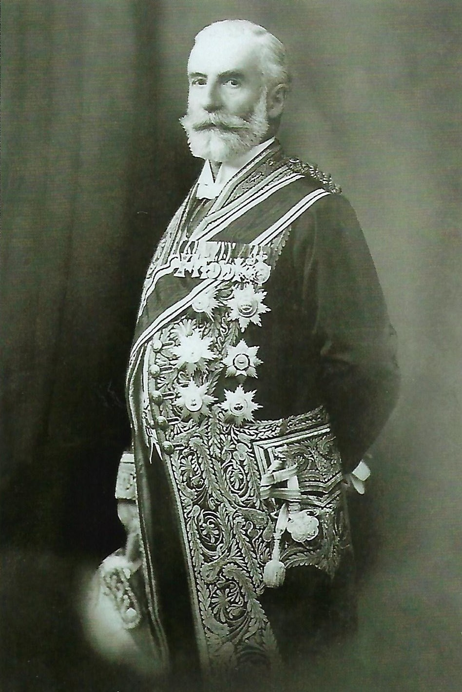 Fotografie von Robert Freiherr Lucius von Ballhausen(1835-1914)